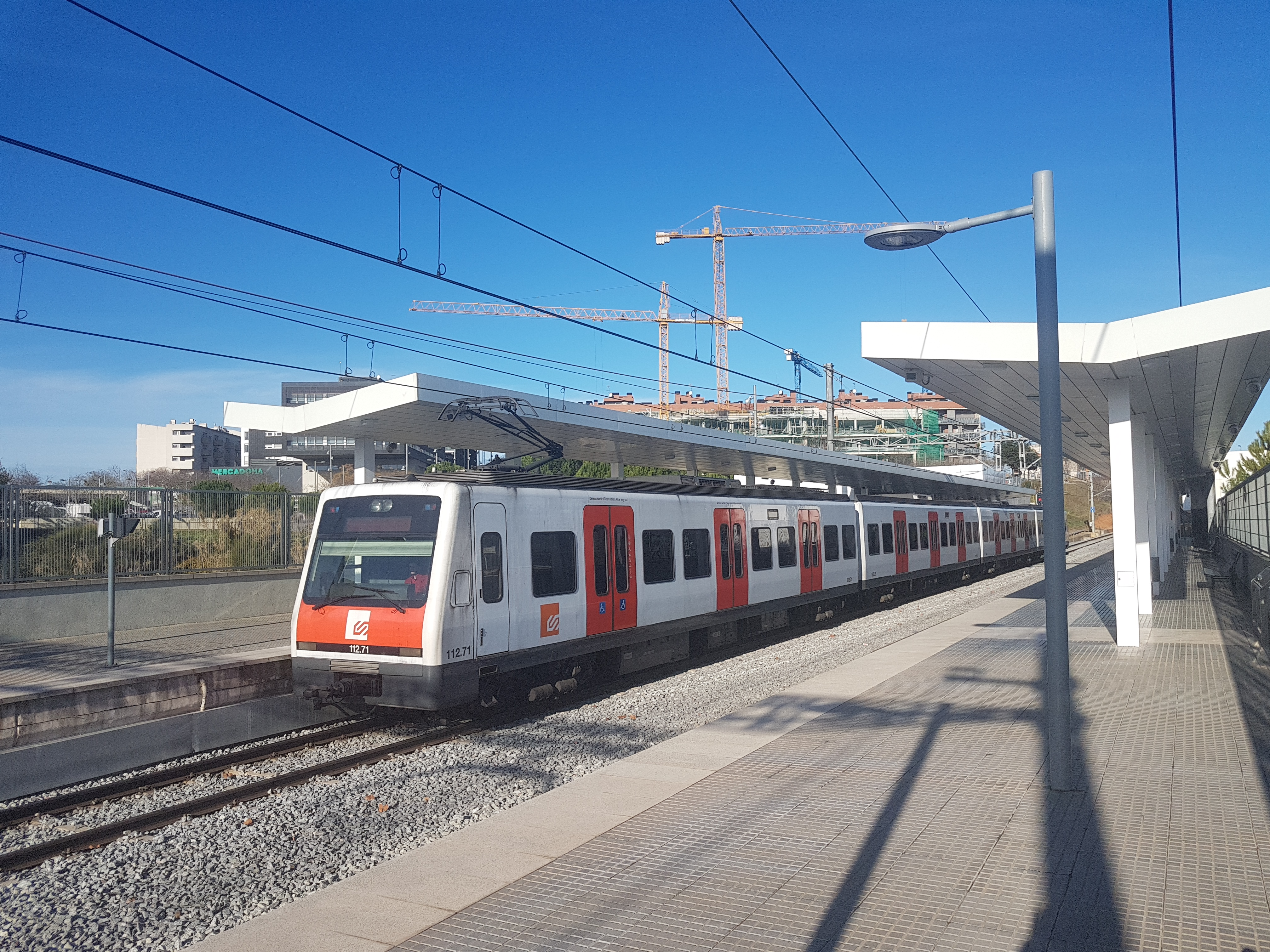 Unitat 112 en servei S2 Barcelona procedent de Sabadell a l'estació Volpelleres.